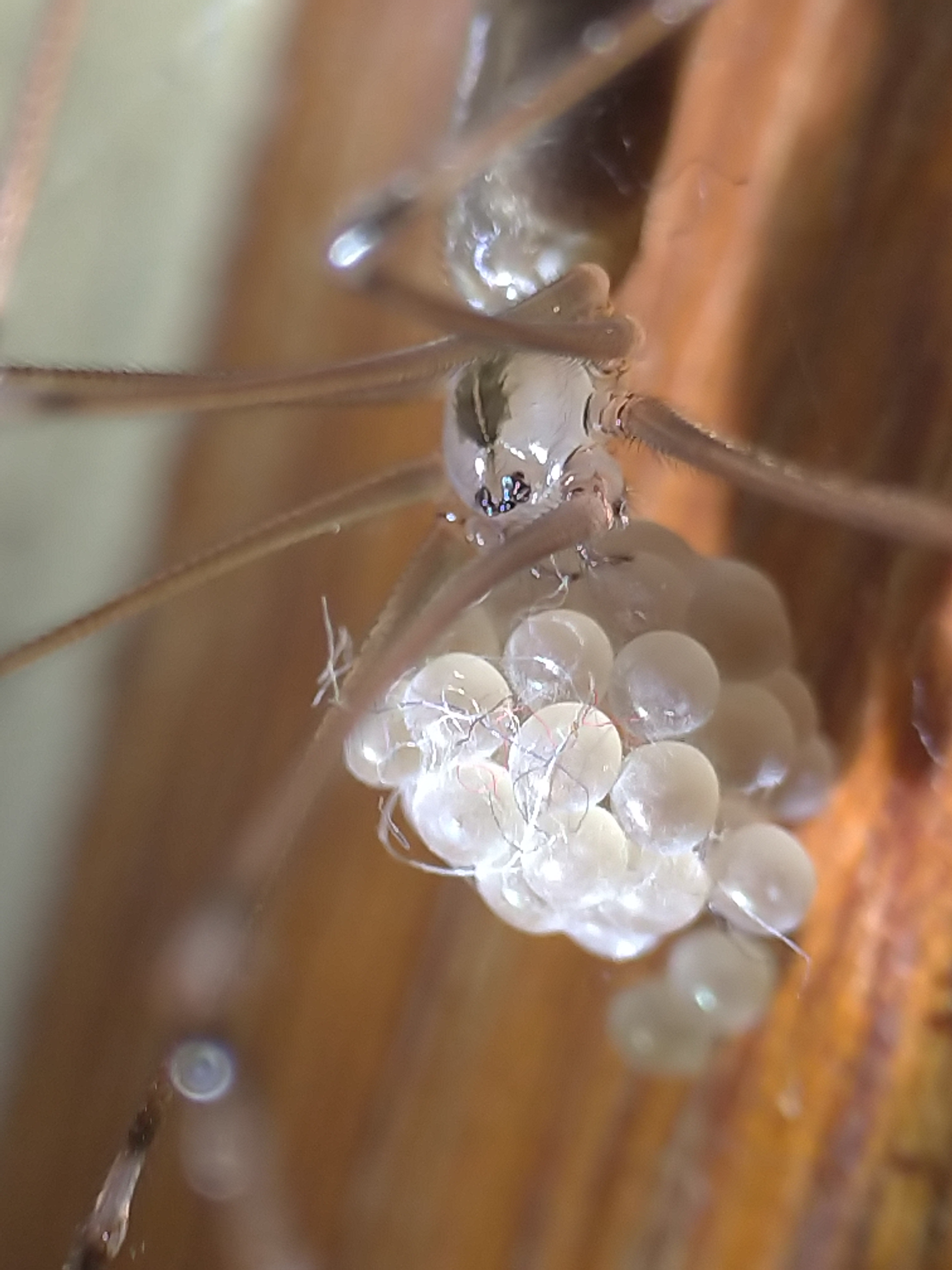 Große Zitterspinne (Pholcus phalangioides) mit Eipaket